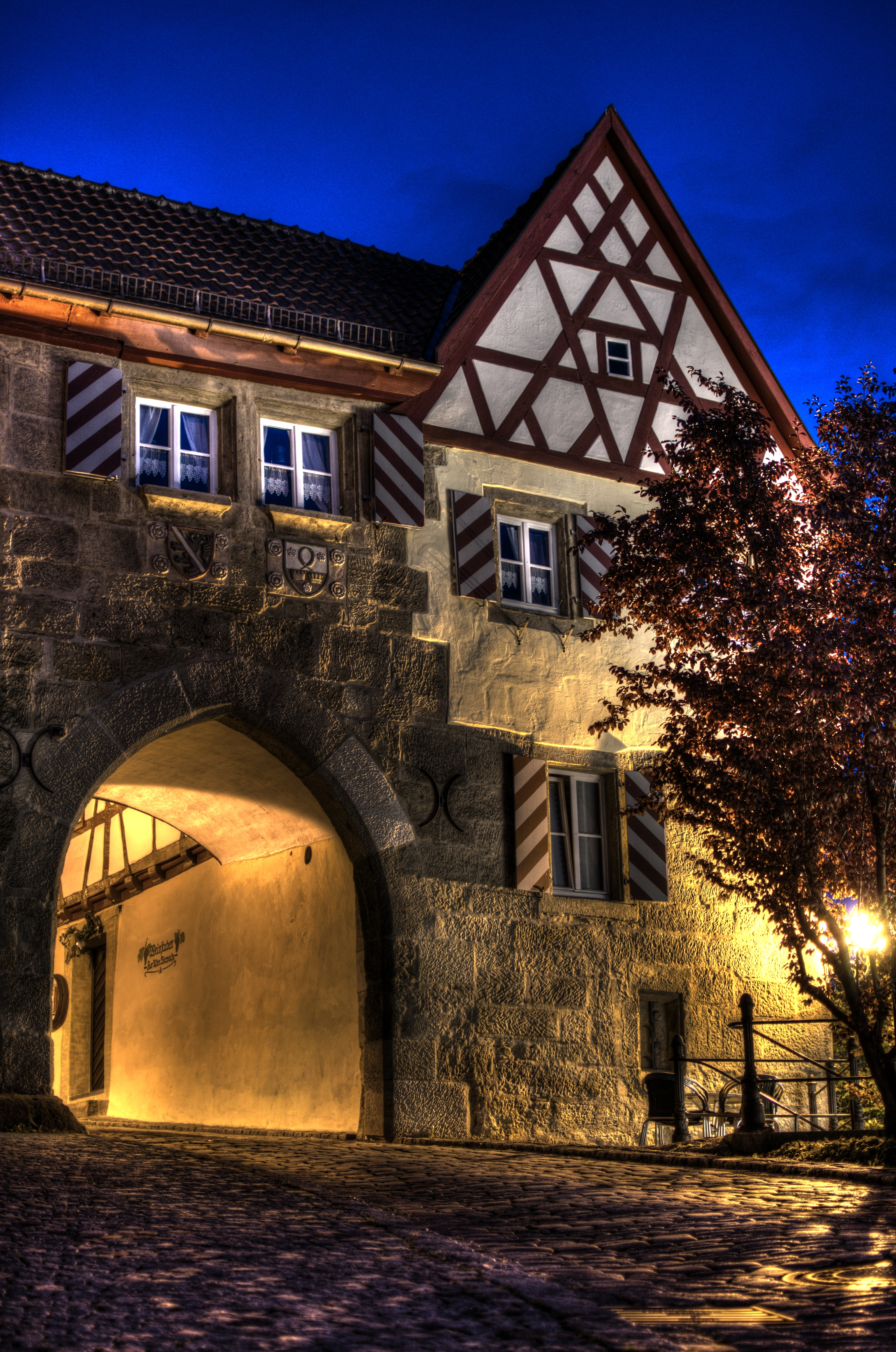 Bamberger Tor bei Nacht als HochkontrastbildThis is a photograph of an architectural monument.